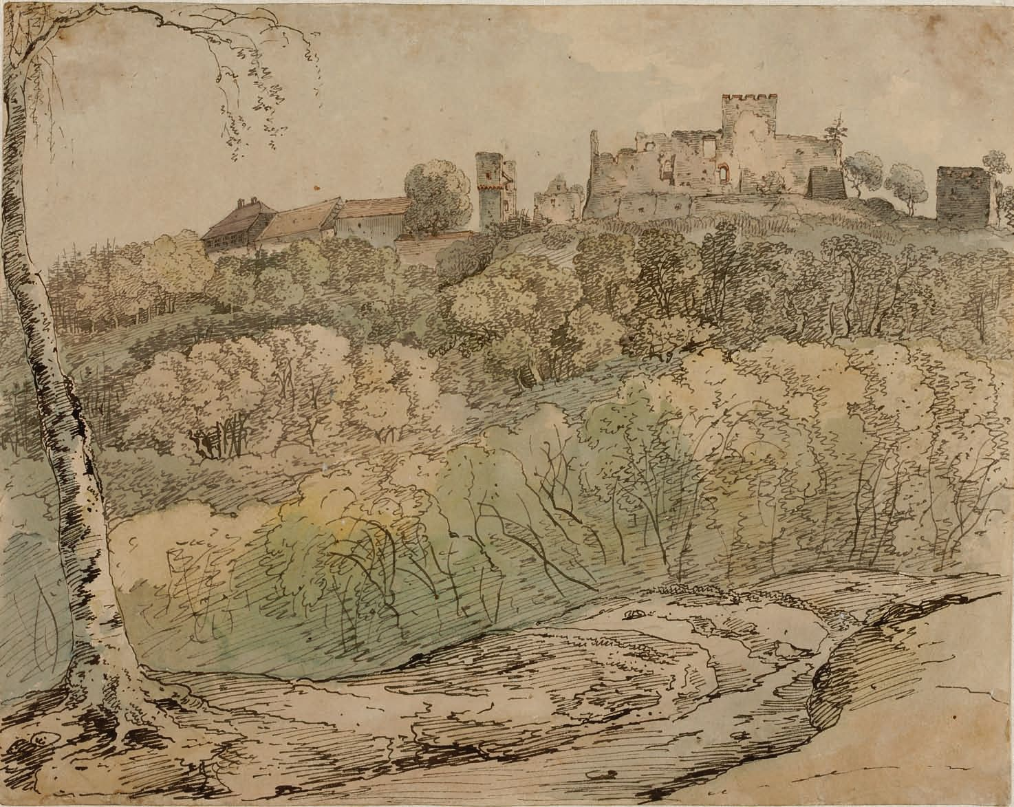 Burg Frankenstein an der Bergstraße